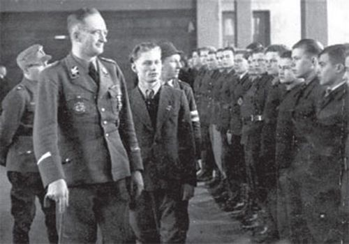 Генеральны камісар Беларусі Курт фон Готберг разам з Усеваладам Радзько і Міхасём Ганько перад строем членаў БСМ (Беларускага саюза моладзі)